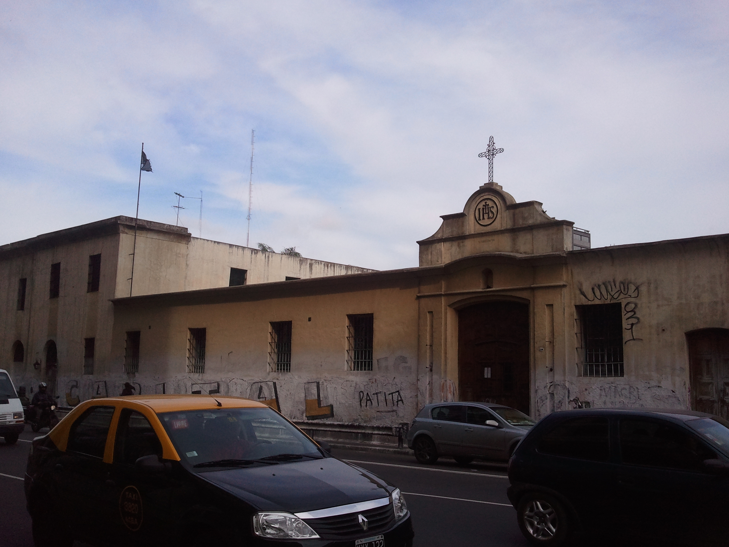 Santa Casa de Ejercicios Espirituales